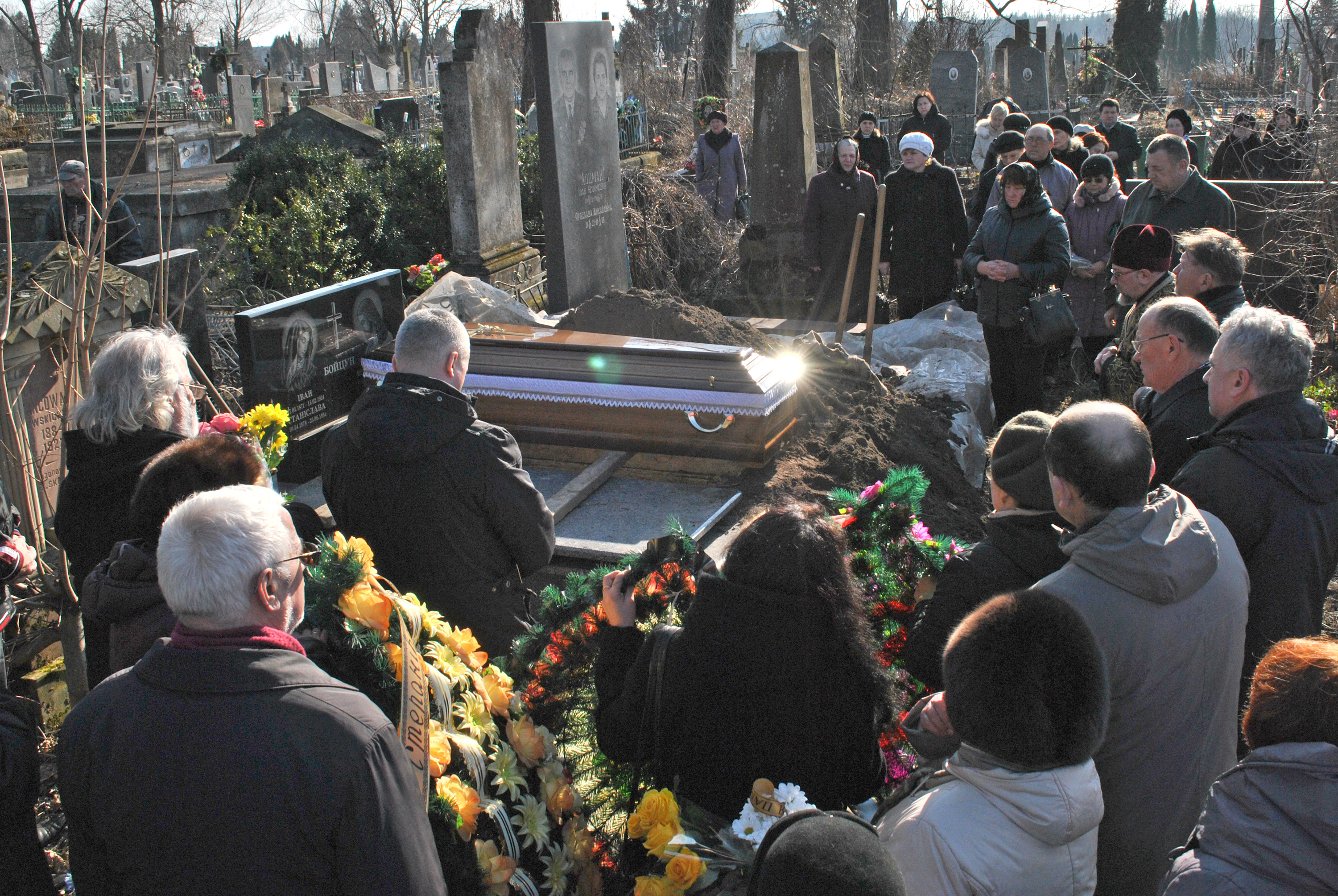 Похорон українського архівіста, краєзнавця, членкині ВУСК, уродженки м. Тернополя, авторки книги «Тернопіль у плині літ» Любомири Степанівни Бойцун (м. Тернопіль, Микулинецьке кладовище, 6 березня 2015 року)